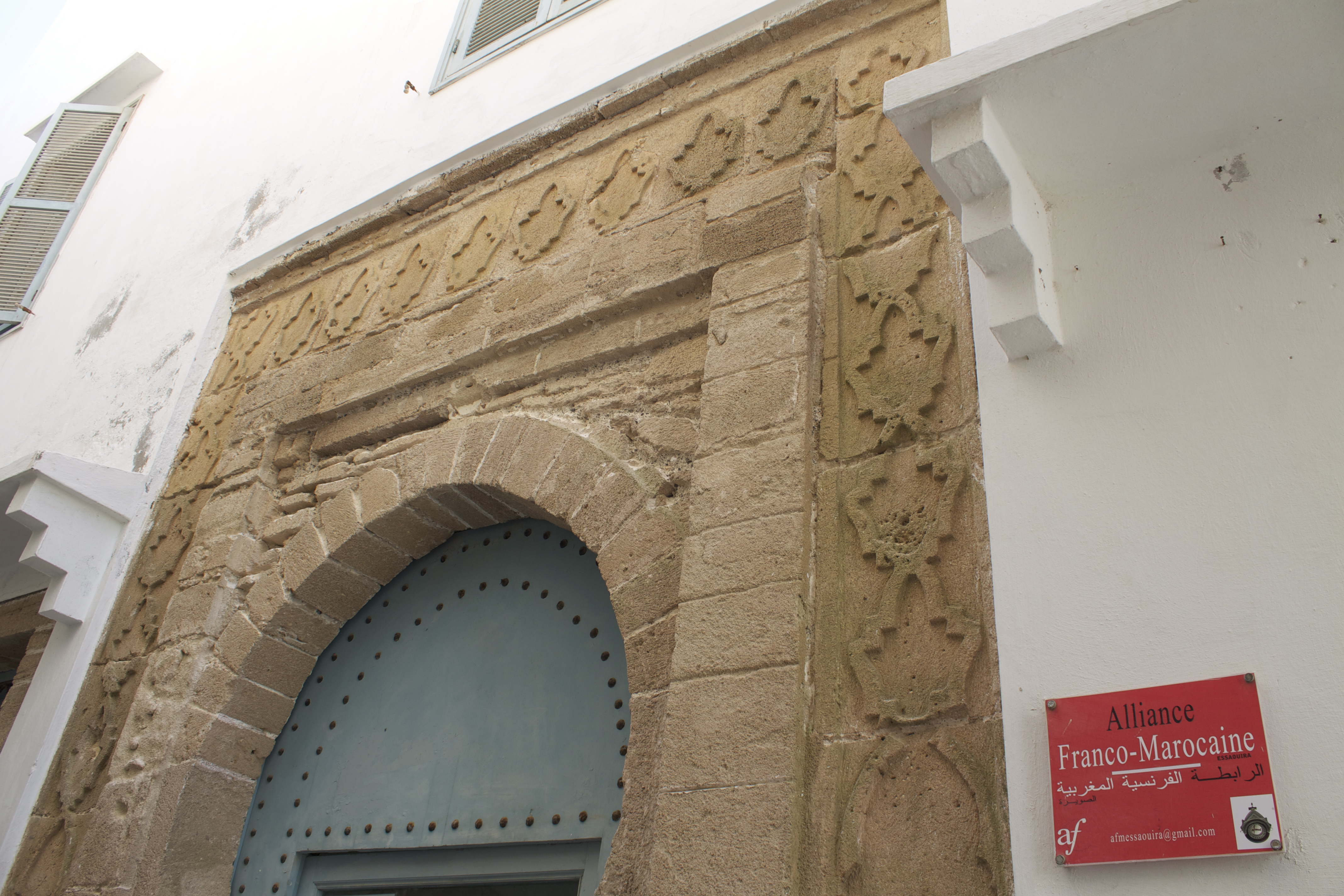 Essaouira